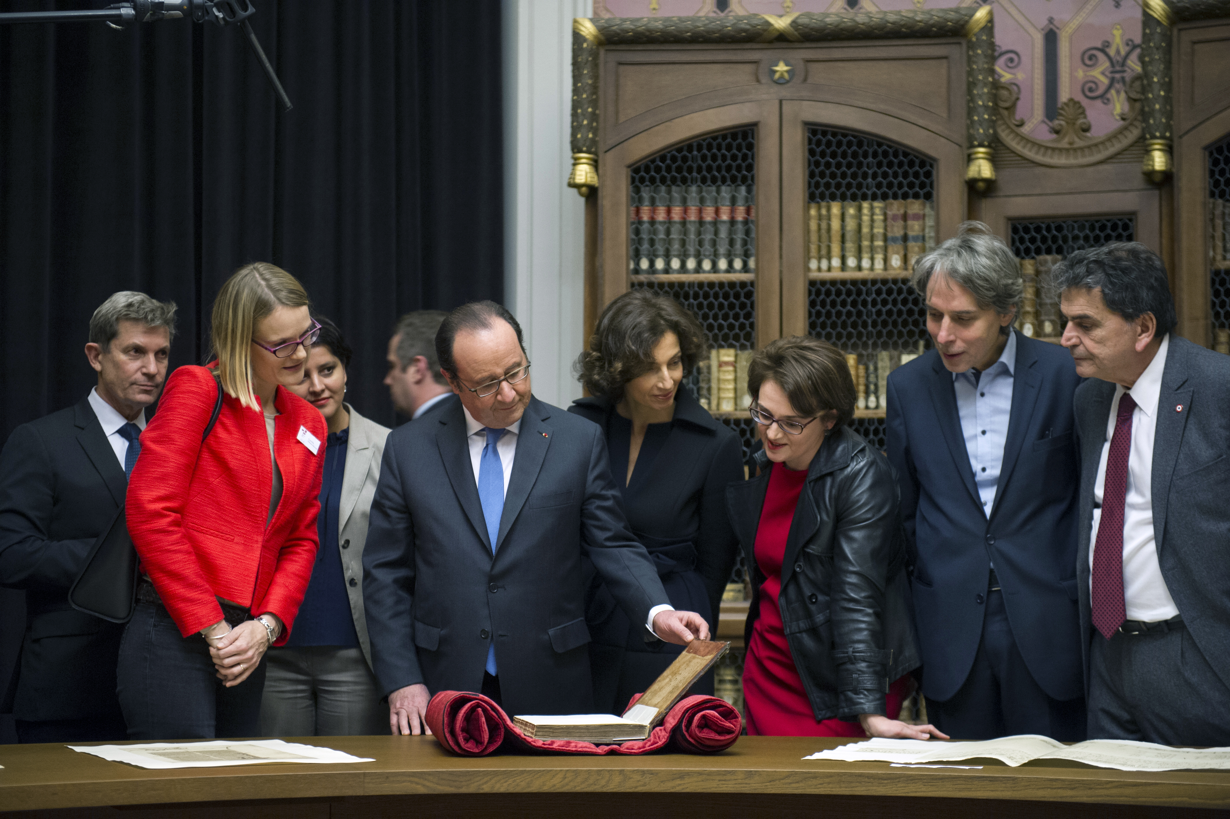 Lors de l'inauguration des espaces rénovés de Richelieu par le président de la République, François Hollande, Michelle Bubenicek, directrice de l'École des chartes, présente certaines pièces remarquables conservées à la bibliothèque de l'École depuis sa création en 1846.